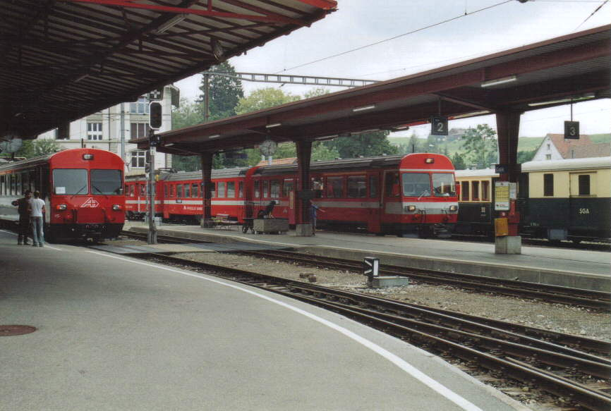 Zwei Triebwagen vom Typ BDe 4/4 (oder BDeh 4/4?) in Gais AR, de:7. August de:2004. Steffen Mokosch